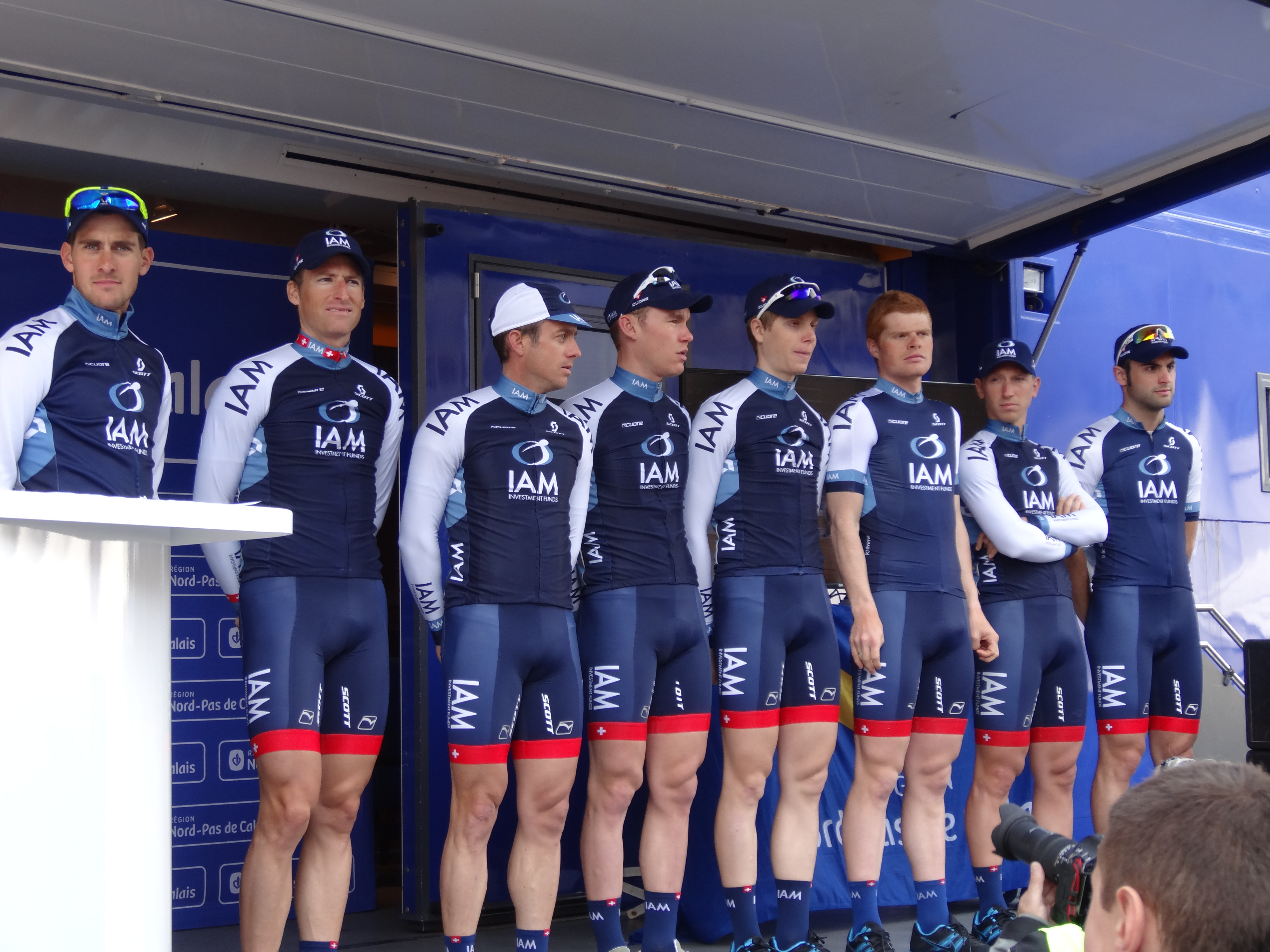 Reportage photographique réalisé le mercredi 1er mai 2013 au départ de la première étape de l'édition 2013 des Quatre jours de Dunkerque à Dunkerque, Nord, Nord-Pas-de-Calais, France. Le dossier photographique montre des véhicules de course exposés, la caravane publicitaire, la présentation des coureurs, et le départ. Depicted people: Pirmin Lang, Martin Elmiger, Sébastien Hinault, Kristof Goddaert and Marcel Aregger